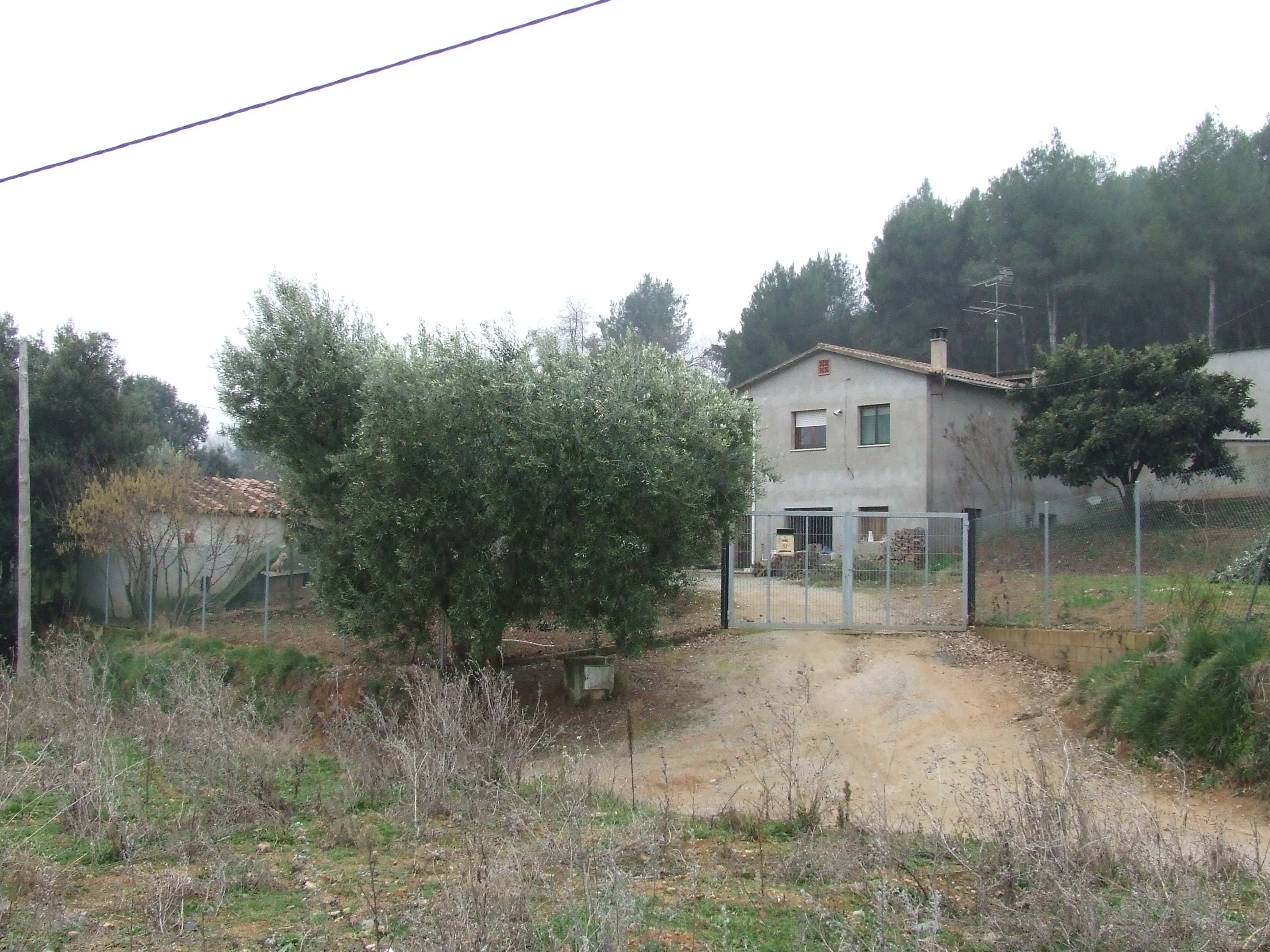 Can Roure (Bigues, Bigues i Riells, Vallès Oriental)